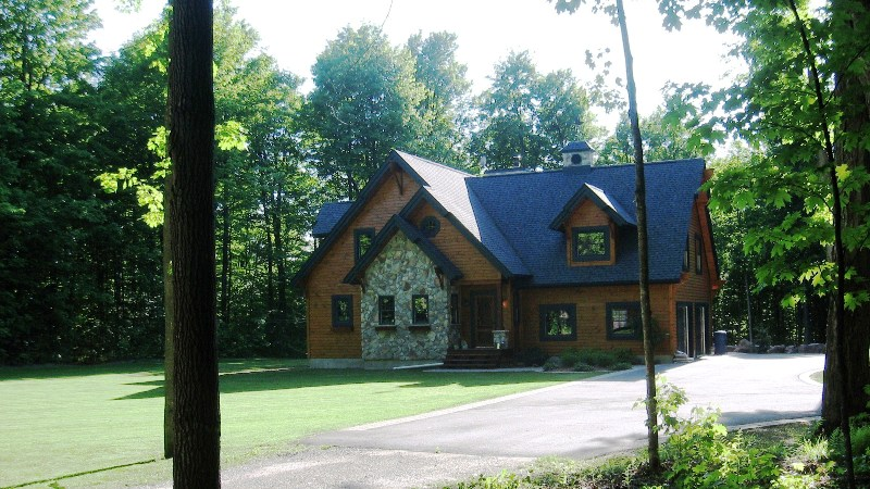 Cabane dans le bois à Roxton Falls